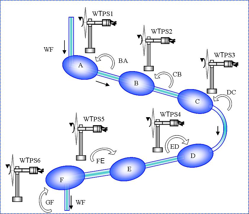 Схема побудови вітротурбінних гідроакумулювальних електростанцій на Дніпровському каскаді руслово-греблевих ГЕС